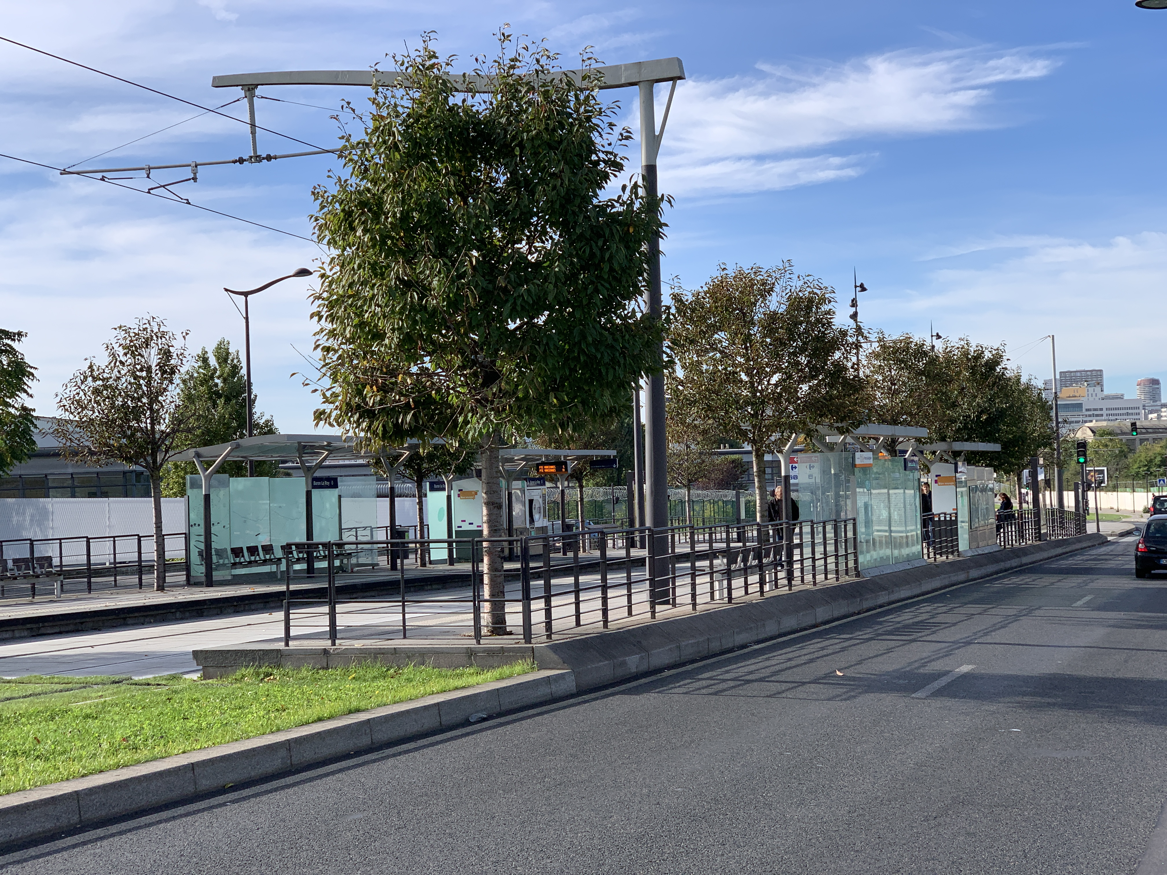 Station Baron Le Roy de la ligne 3a de tramway d'Île-de-France, Paris.